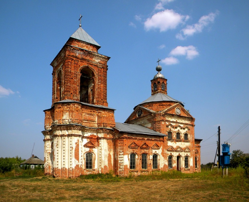 Церковь Воздвижения Креста Господня - Рогозна - Дмитриевский район - Курская область